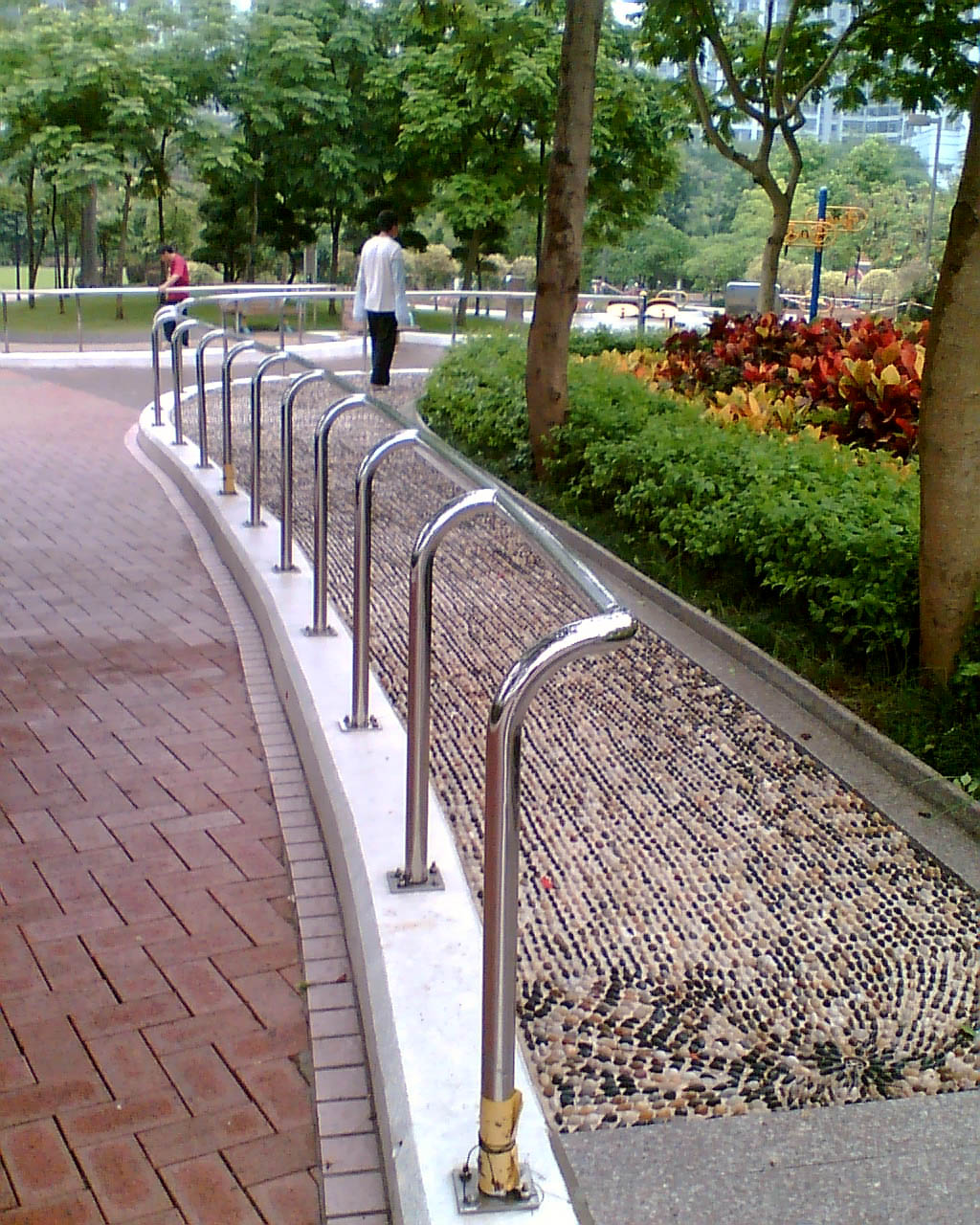 馬鞍山公園卵石徑